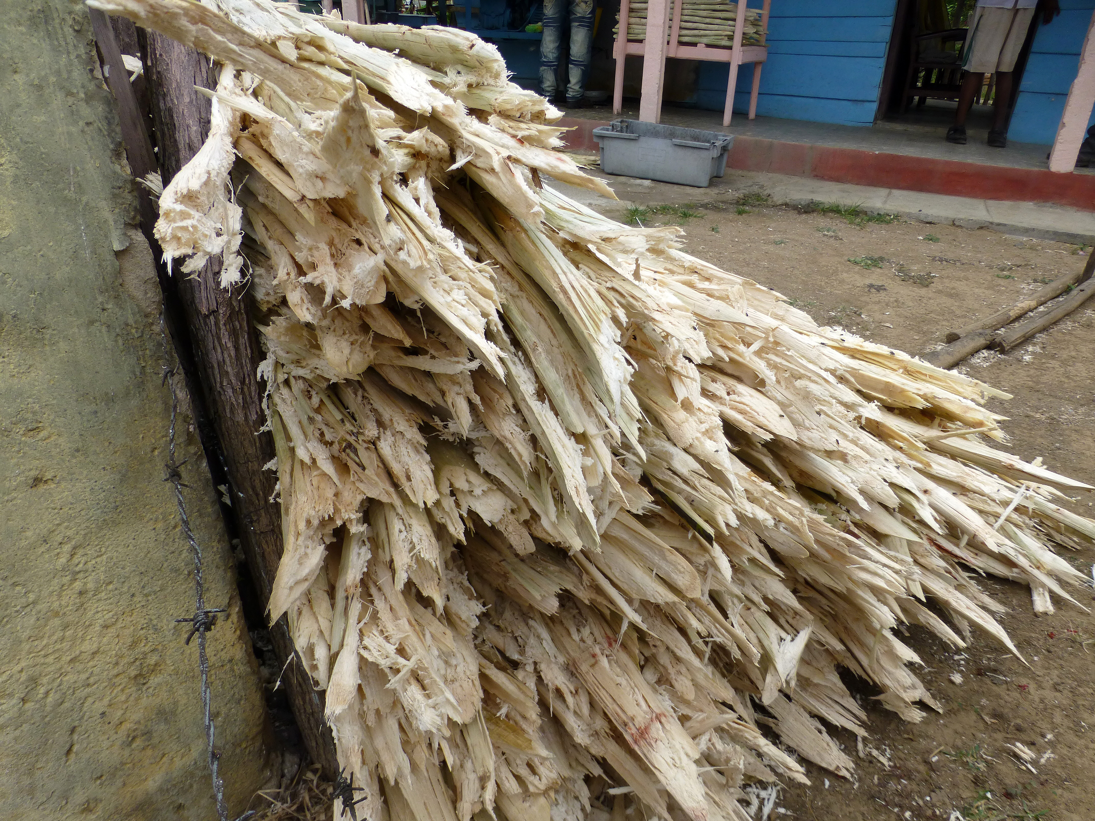 Valle de los Ingenios, Cuba : bagasse (résidus de la canne à sucre après l'extraction du jus)